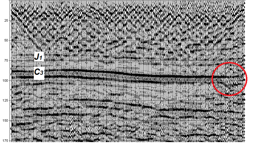 Динамический глубинный разрез, созданный в результате обработки данных сейсморазведки